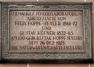 Tübingen, Schloss Hohentübingen, Innenhof, drei Tafeln